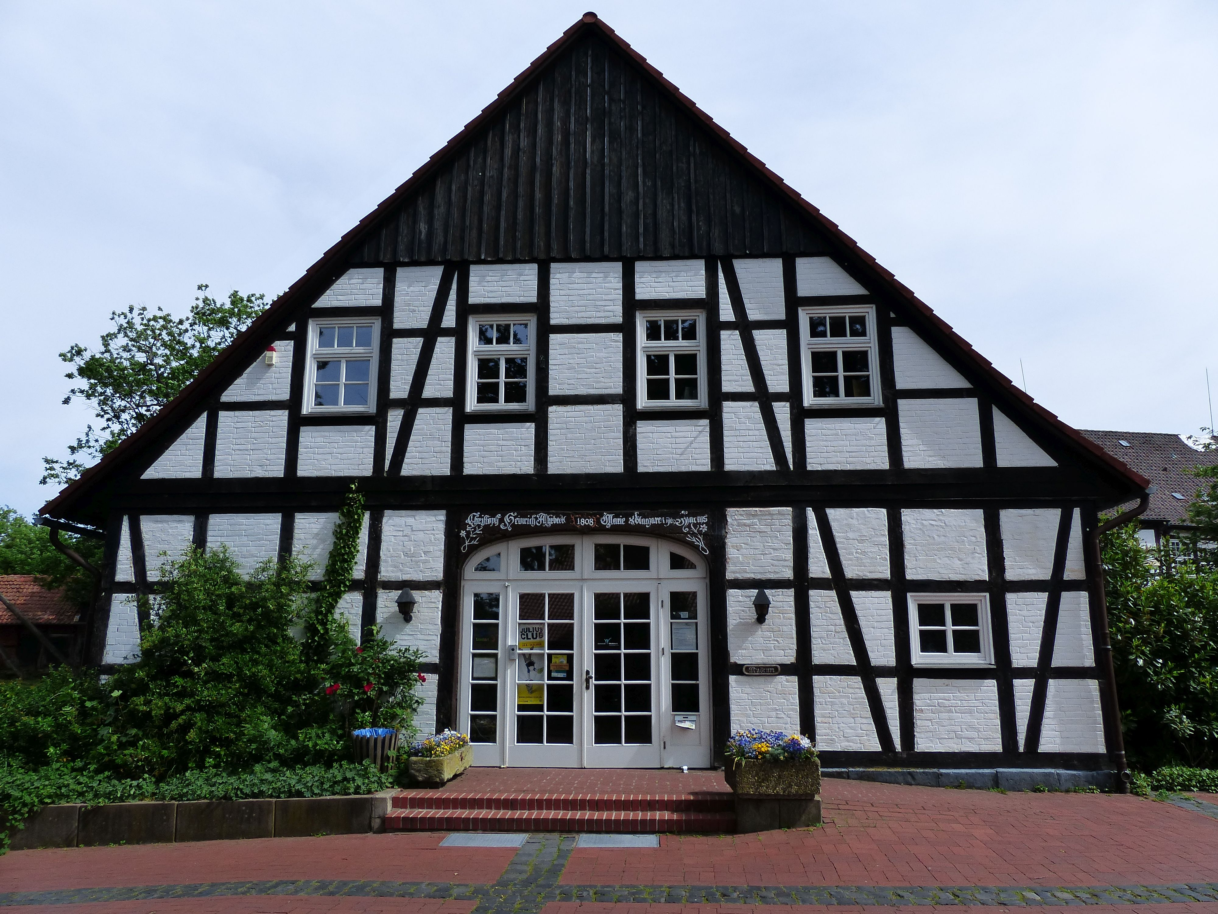 Der alte Amtskrug ist heute Bibliothek und Museum